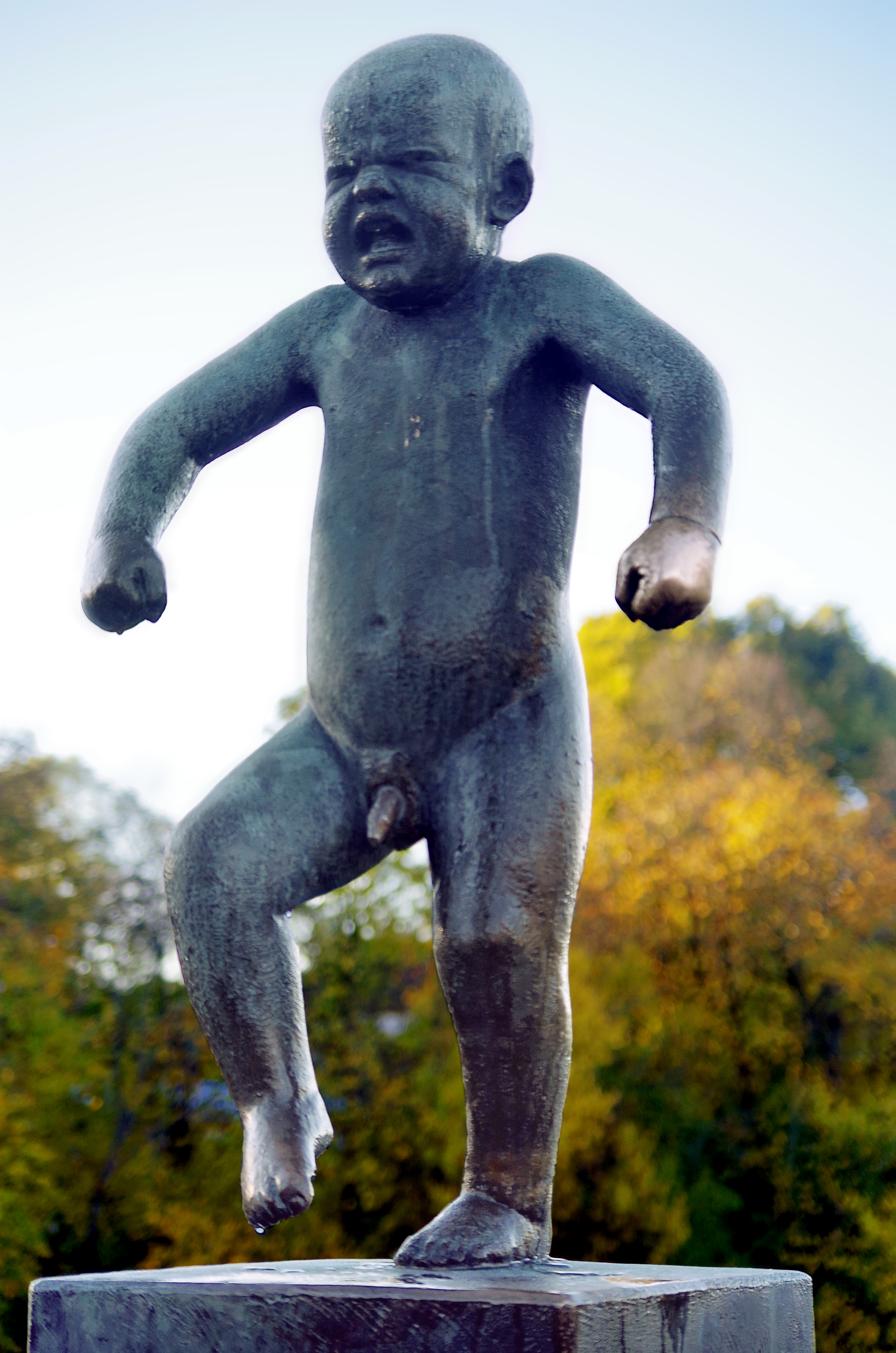 Vigelandsanlegget Trotzkopf auf der Brücke